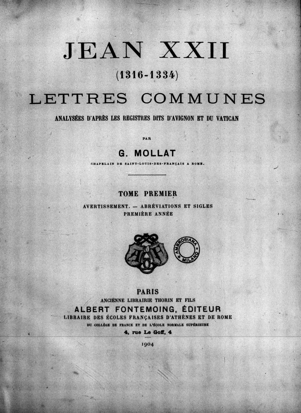 Frontespizio